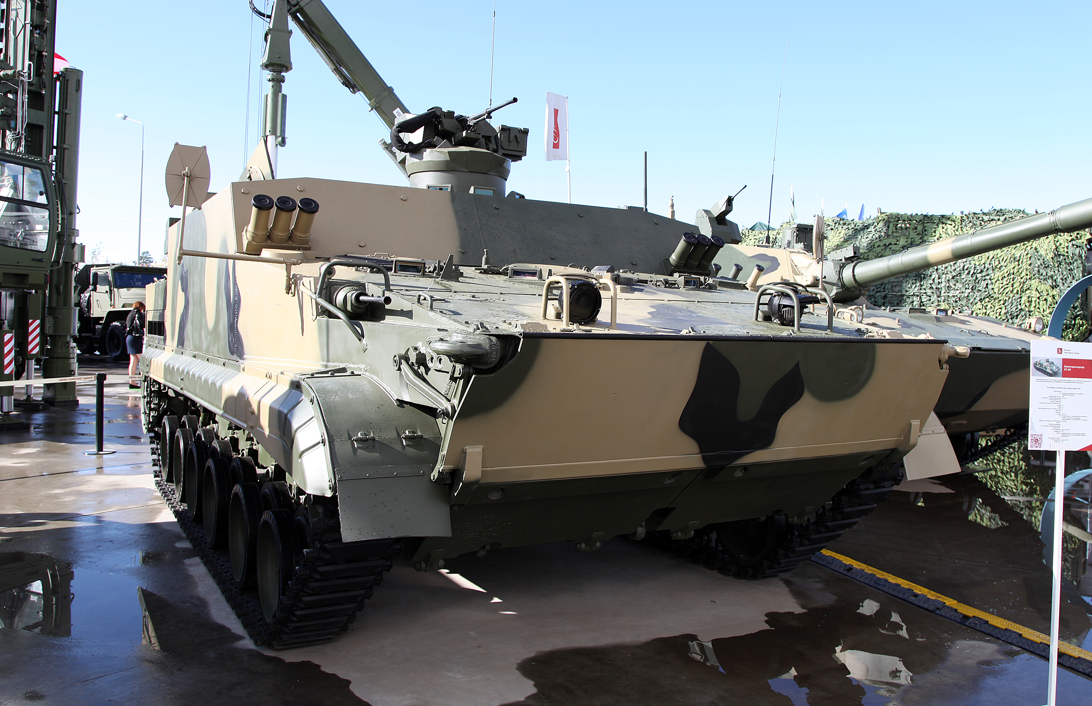 Бронетранспортер БТ-3Ф (BT-3F armored personnel carrier)